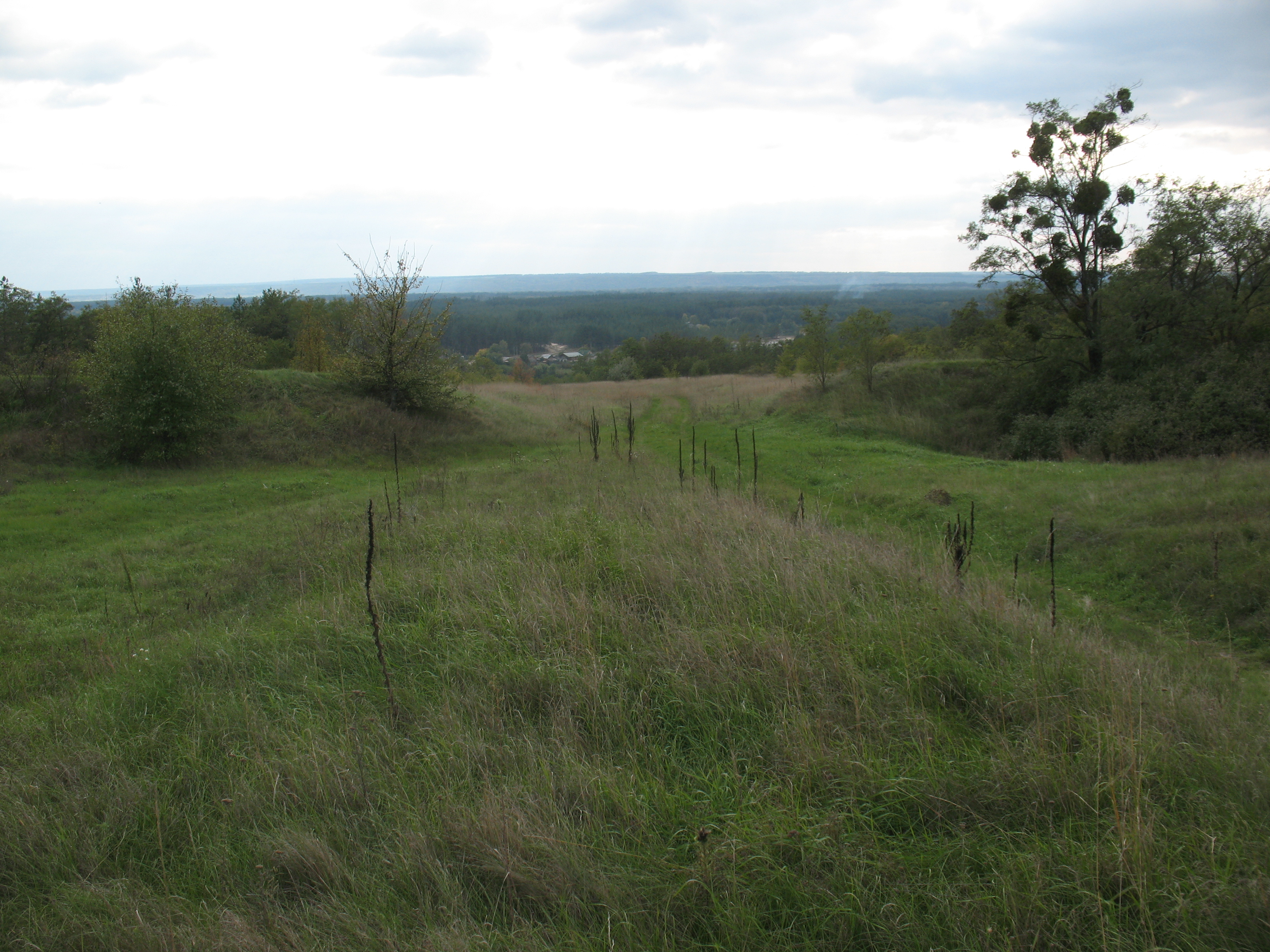 Внешний оборонительный вал и ров, заросший деревьями, русской крепости Царёв-Борисов. Вид изнутри. Внизу виден Красный Оскол.